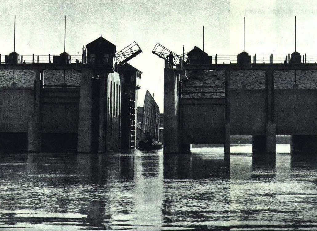 1965-4 1965年蒋家嘴排水闸